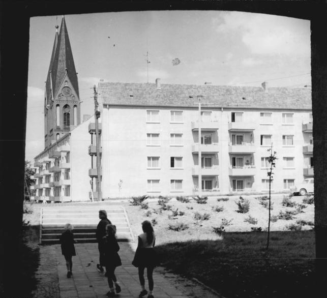 Frankfurt/Oder, Wohnblocks, Friedenskirche Zentralbild Gesau Sta-Pr 4.9.1963 Frankfurt-Oder mit neuem Gesicht - In fünf Jahren fast 2 500 Wohnungen gebaut. Die Oderbezirksstadt Frankfurt erhielt in den letzten fünf Jahren durch den Neubau von nahezu 2 500 Wohnungen sowie entsprechenden gesellschaftlichen Bauten ein neues Gesicht. Seit den Volkswahlen 1958 zogen in diese neuen Wohnkomplexe 7 930 Bewohner ein. Mehr al zwei Drittel der 1945 in Frankfurt-Oder gezählten Wohngebäude und fast die gesamte Innenstadt warenim zweiten Weltkrieg zerstört worden. UBz: In der neuen Innenstadt von Frankfurt-Oder, Durchgang zur Großen Scharrnstraße; im Hintergrund die Friedenskirche, die ebenfalls im Kriege beschädigt wurde und Heute von vielen Neubauten umgeben ist.